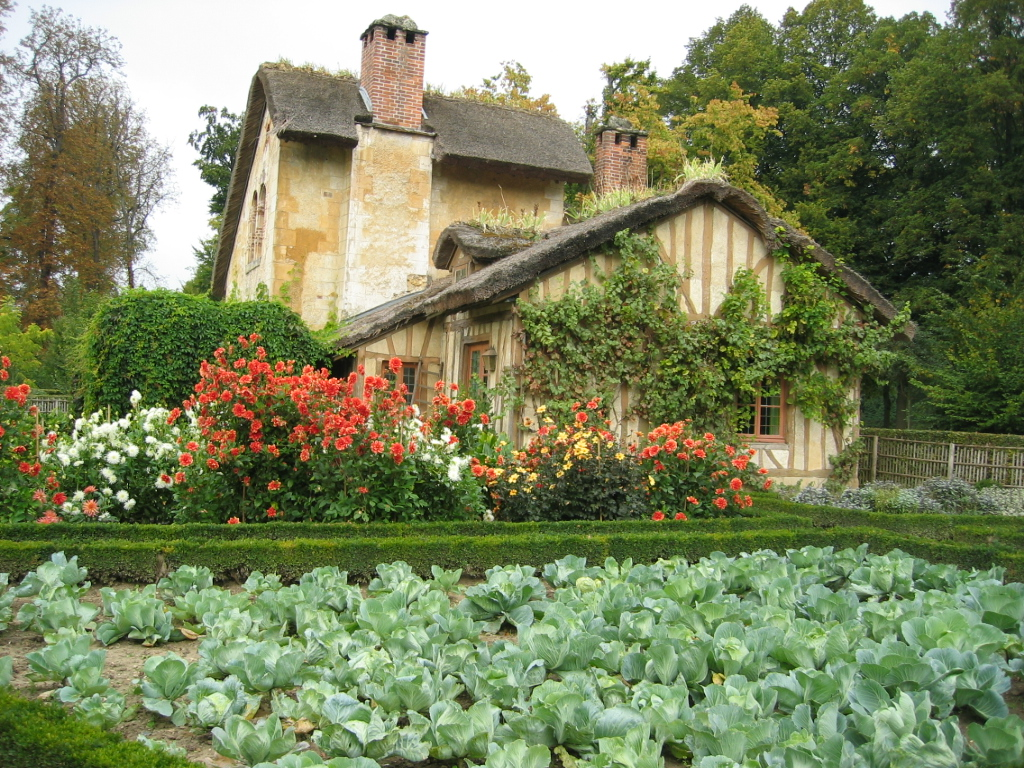 Maison du garde au Hameau de la Reine - Versailles